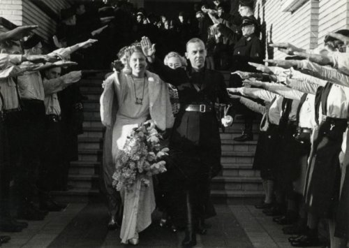 Huwelijk van NSB-voorman (Nederlands nationaal-socialist) Meinoud Rost van Tonningen (1894-1945) met Florentine Heubel, waarbij iedereen de Hitlergroet brengt, 21 december 1940, vermoedelijk te Hilversum, raadhuis.